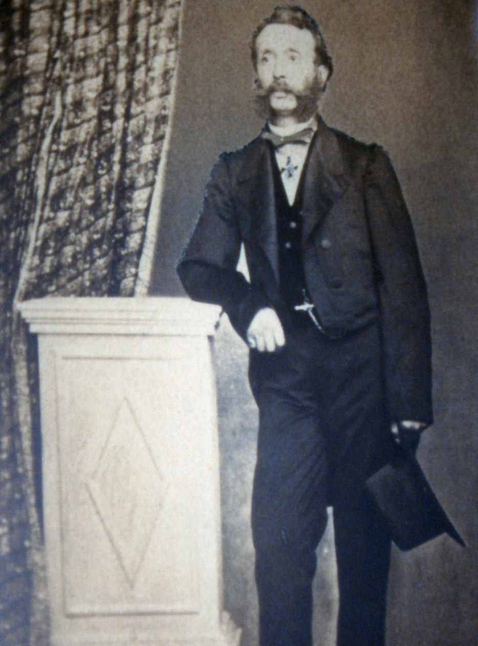 מזרקי